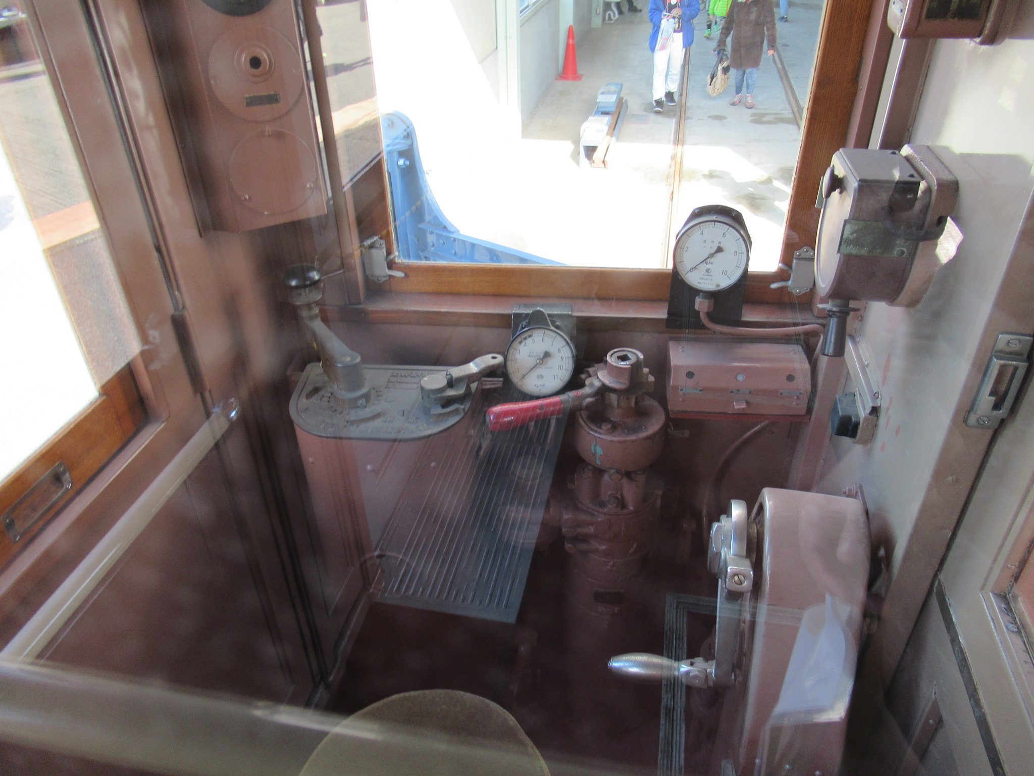 大阪市営地下鉄 105号制御器